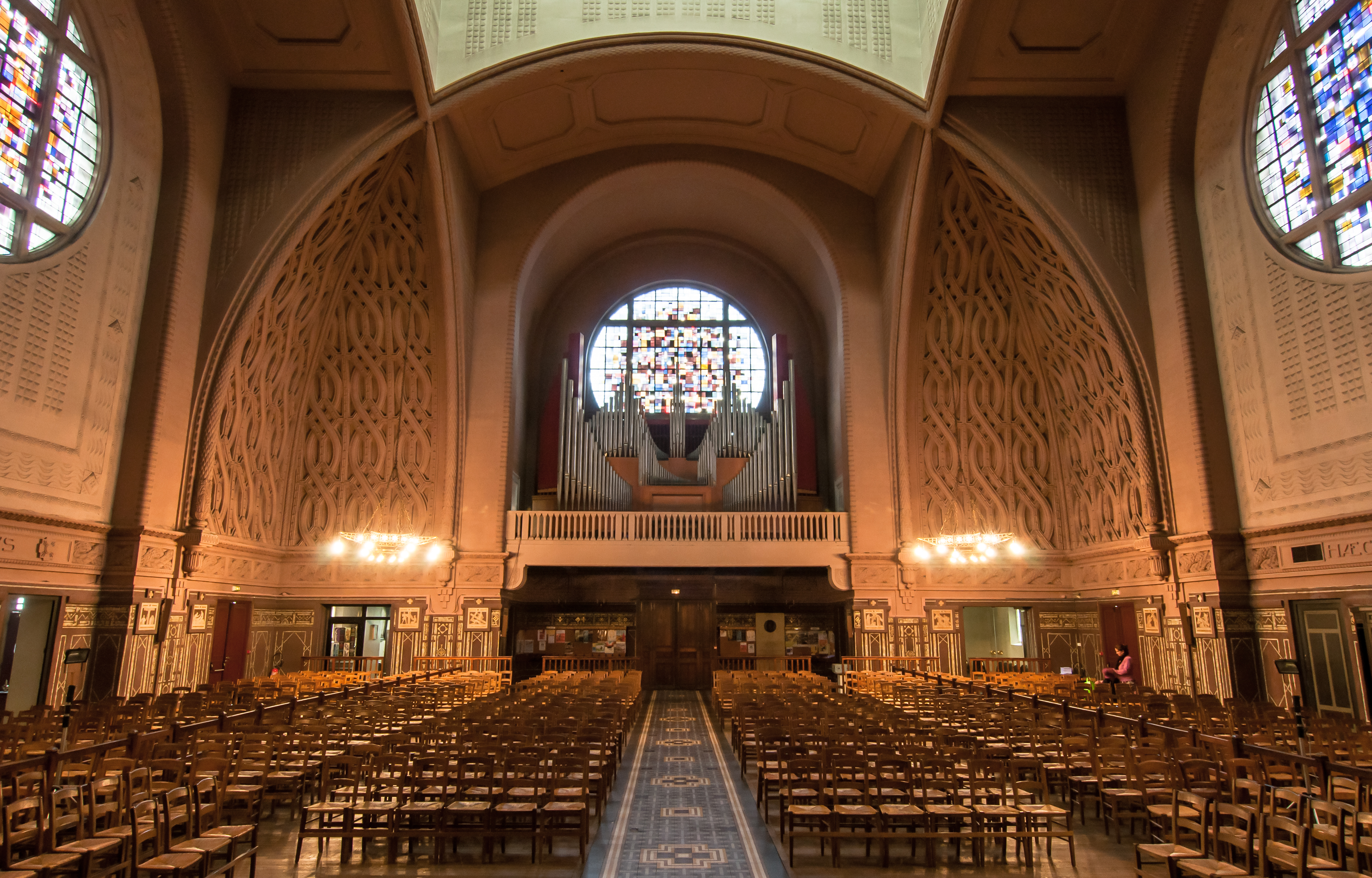 Intérieur de l'église Sainte Jeanne d'Arc de Versailles, vue sur l'orgue (ancien instrument du studio 103 de Radio France)